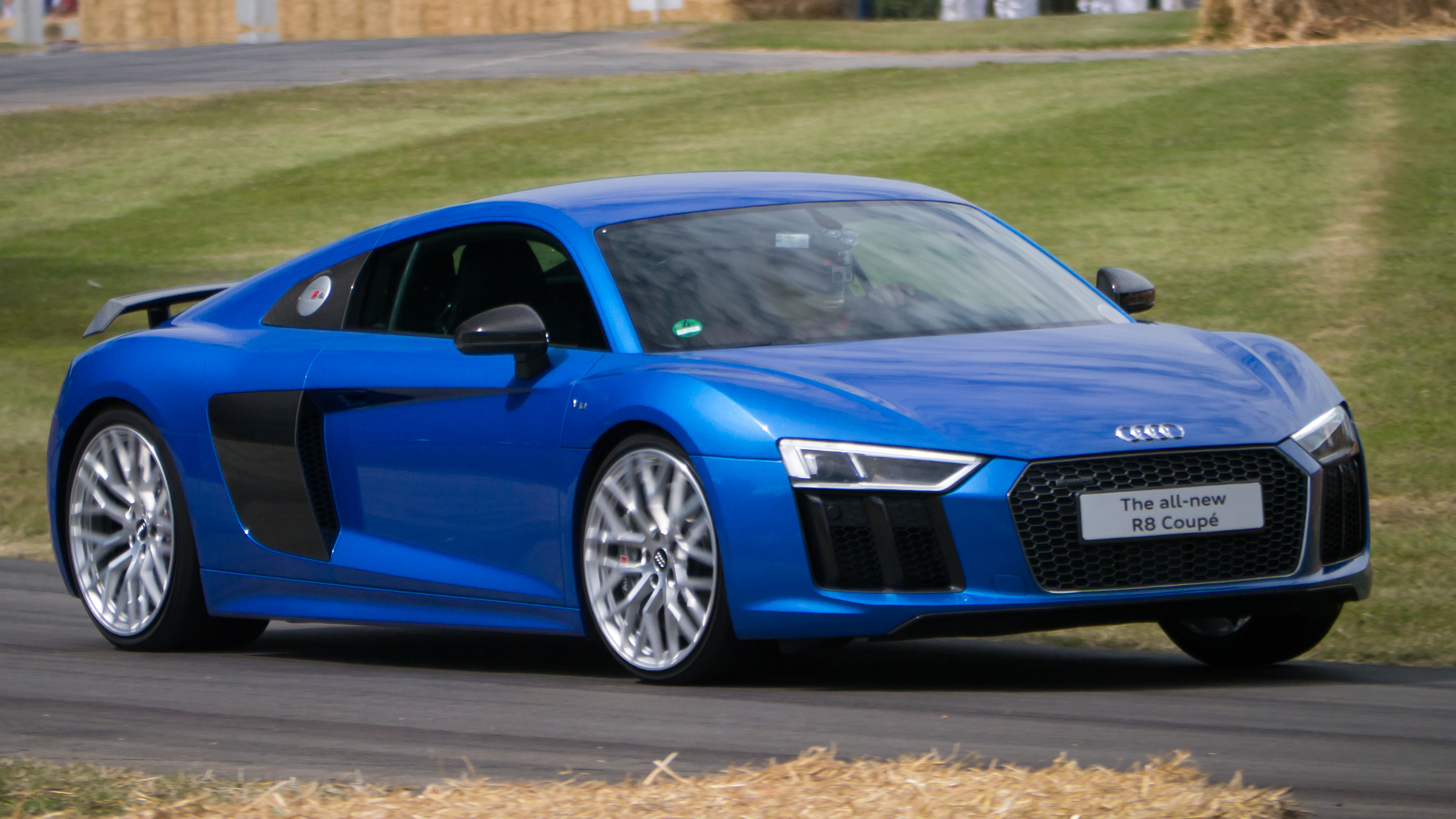 2015 Audi R8 Coupé 5.2 FSI quattro